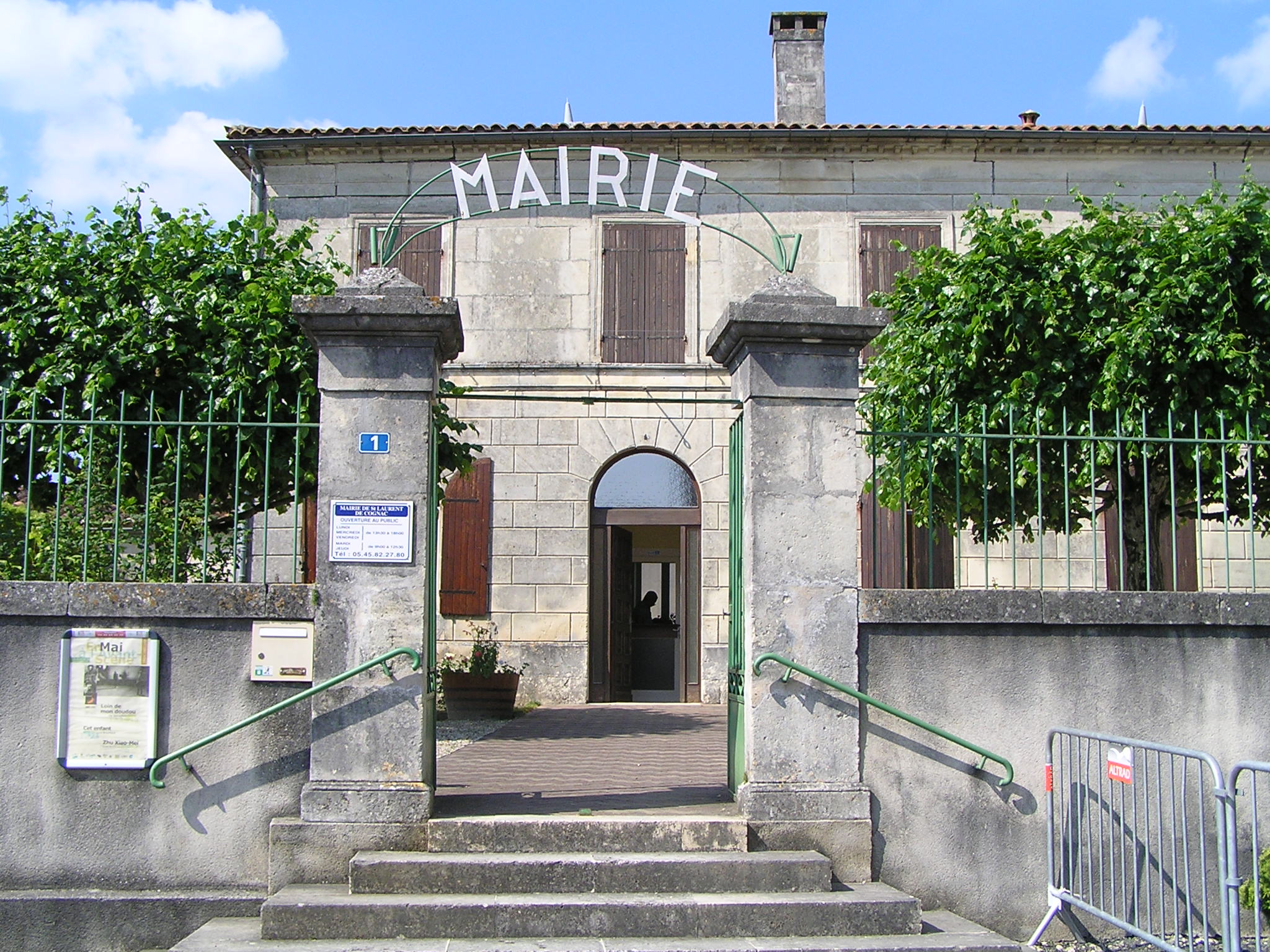 mairie de Saint-Laurent-de-Cognac